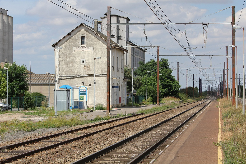 Gare de Boisseaux depuis les voies, Boisseaux, département du Loiret, Centre, France.